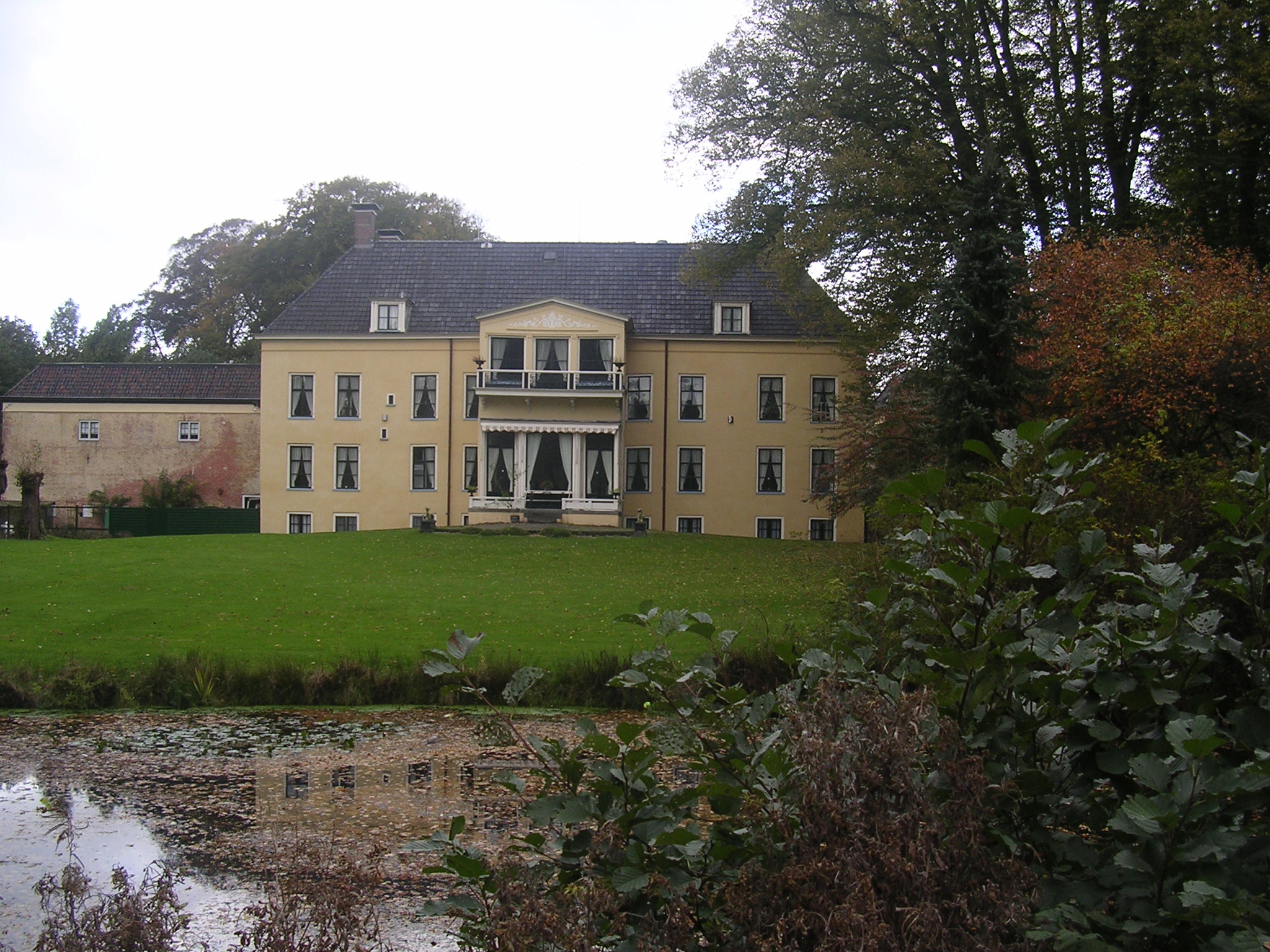 Achterkant Fogelsangh State.